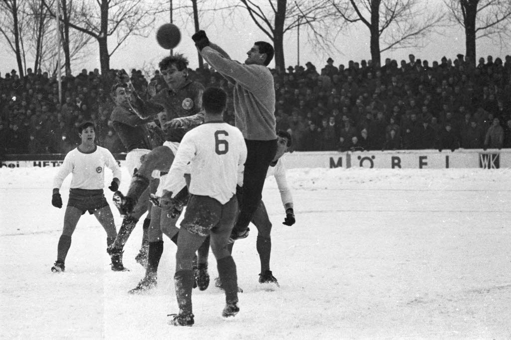 im Holsteinstadion. Im Bild u.a. Bielefelds Torwart Andreas Triebel (2.v.r.), Holsteins Rainer Skrotzki (4.v.r.) und Uwe Witt (5.v.r.).